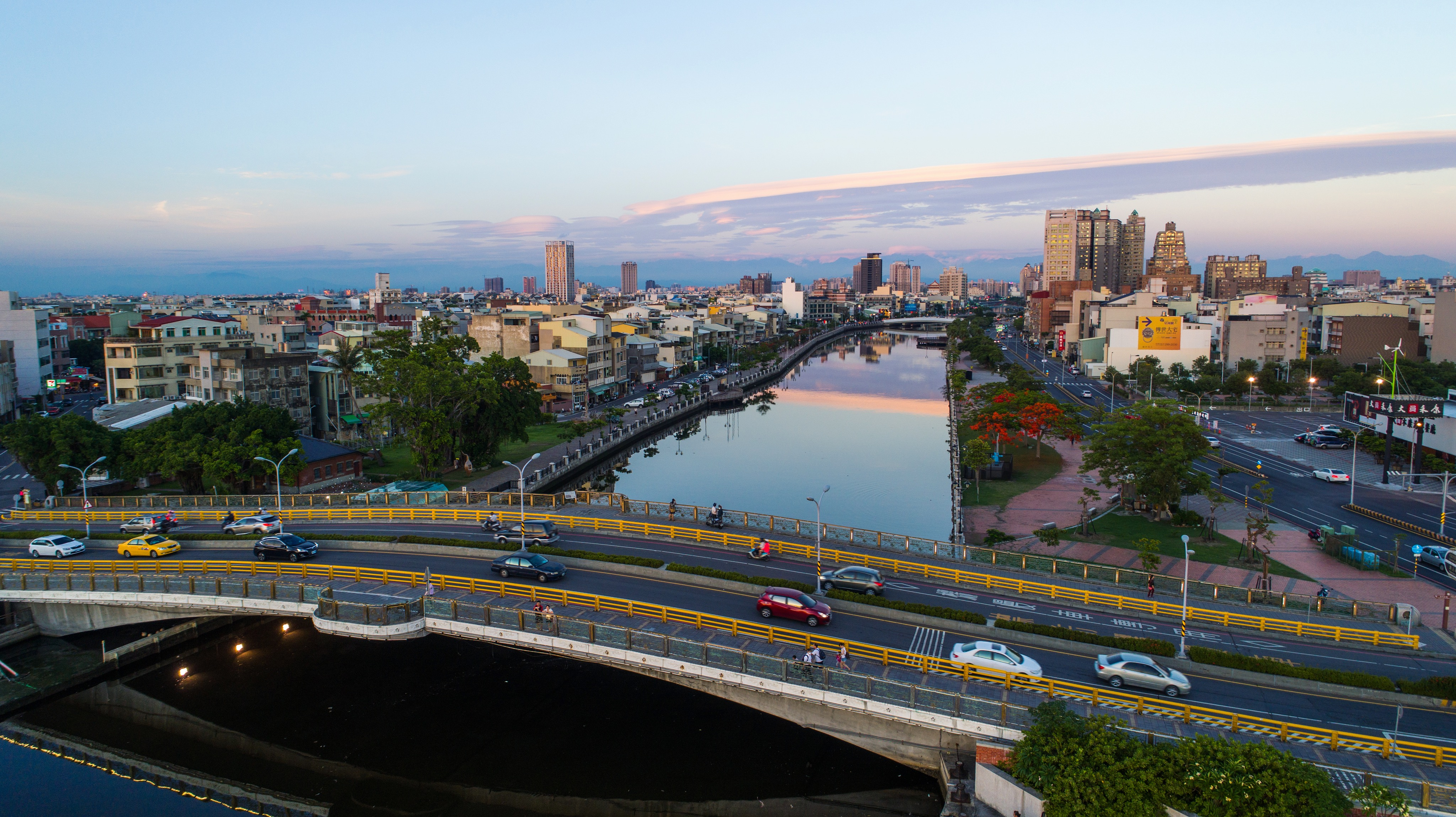 中文（台灣）: 安平區安億橋